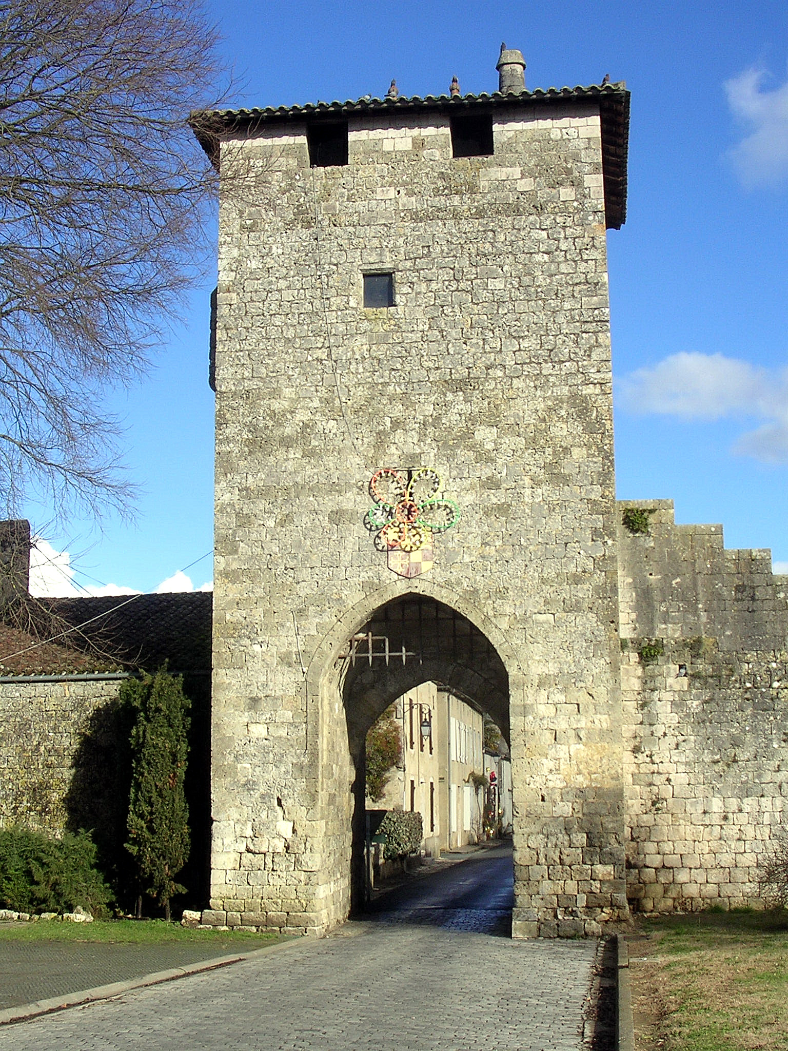 Vianne, porte de la ville bastide (Lot-et-Garonne, France)